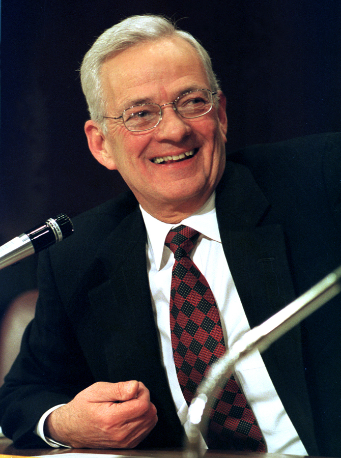 Paul H.O'Neills